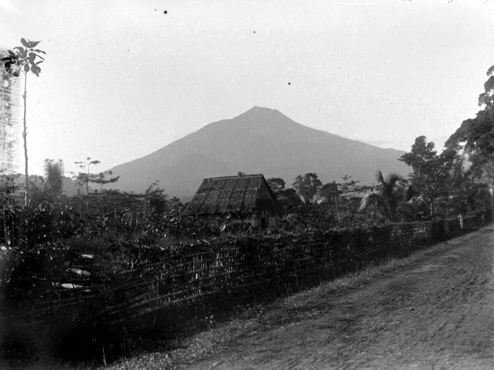 Negatief. Foto is genomen tijdens de Wichmann Expeditie naar Noord Nieuw-Guinea. Gezicht op de vulkaan Klabat, Celebes